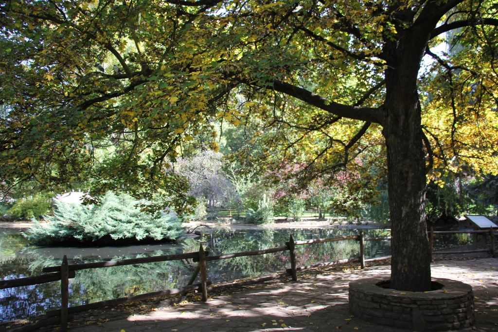 A la sombra de Arce Menor. Al atardecer los pavos vuelan desde el cerramiento del estanque hasta la copa de este árbol para pasar la noche